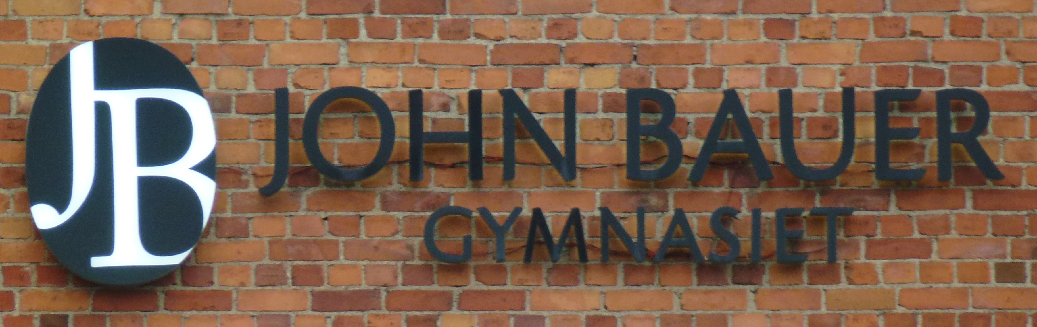 Söderberg & Haaks tidigare fastighet i Marievik "John Bauer Gymnasiet"